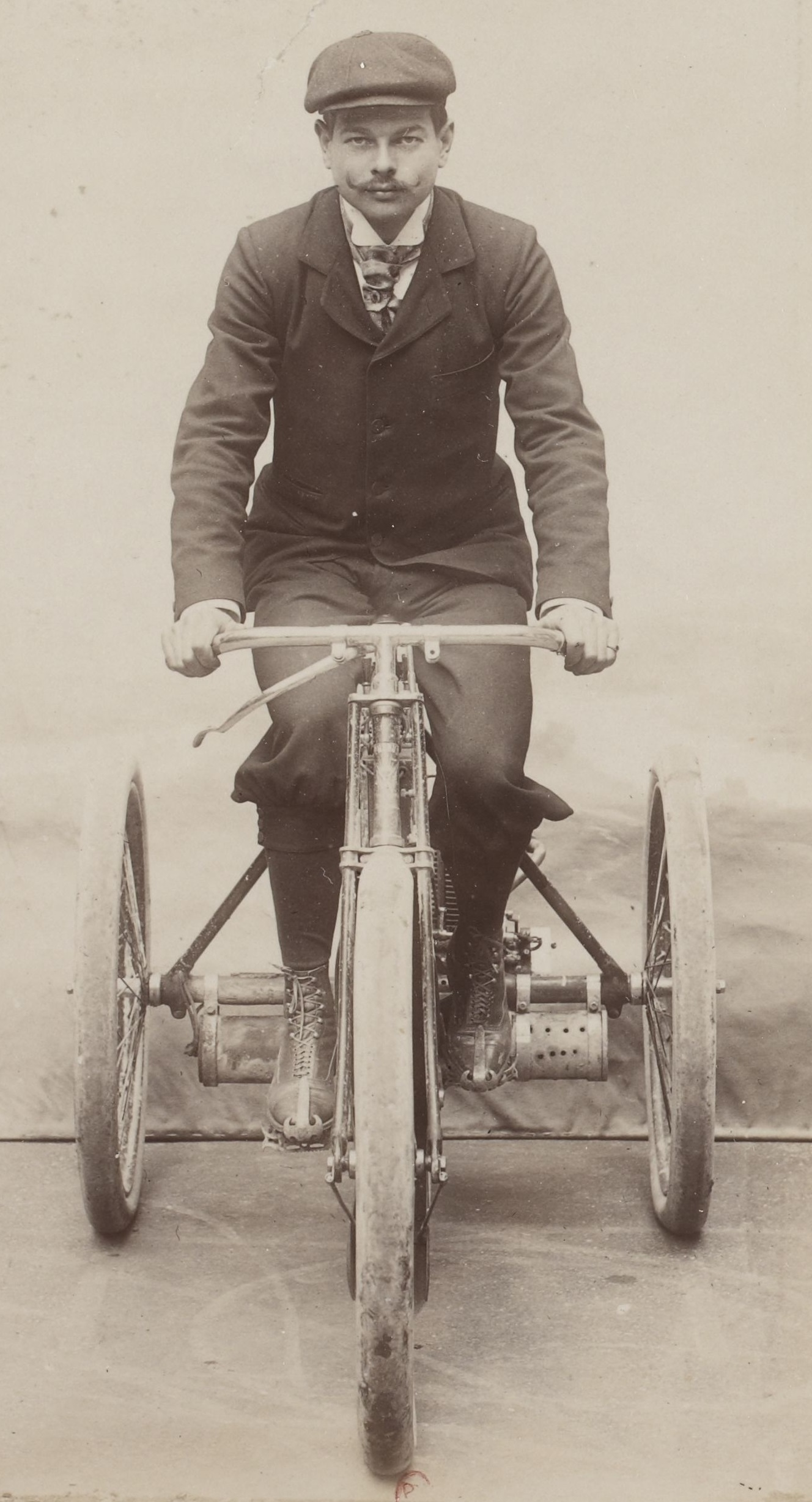 [Collection Jules Beau. Photographie sportive] : T. 6. Année 1898 / Jules Beau : F. 28. Marcellin ; Cabaillot, Tournier, Mouze